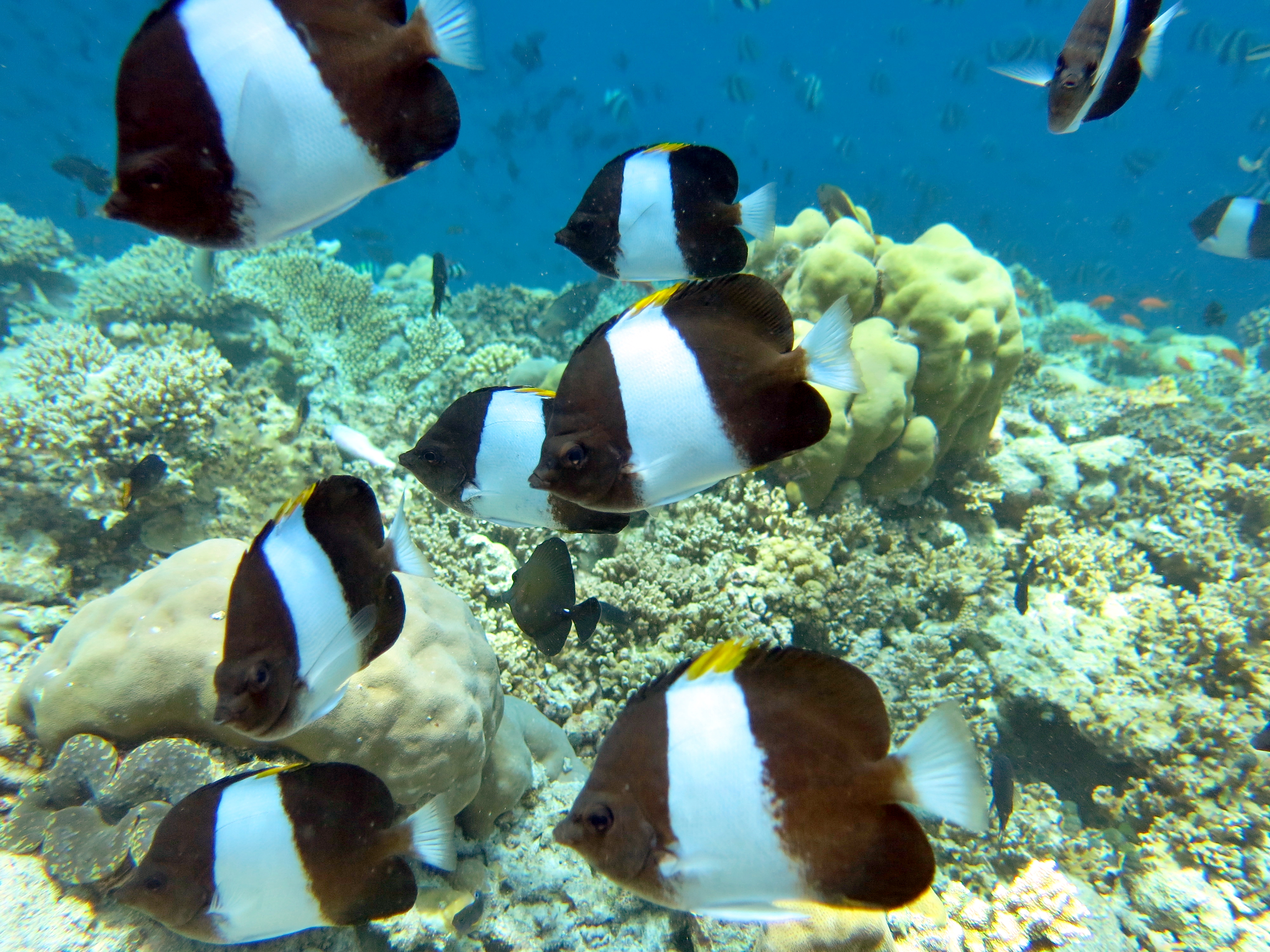 Un groupe de poissons-papillons pyramide noirs (Hemitaurichthys zoster), aux Maldives (Hulhudhoo, atoll de Baa).